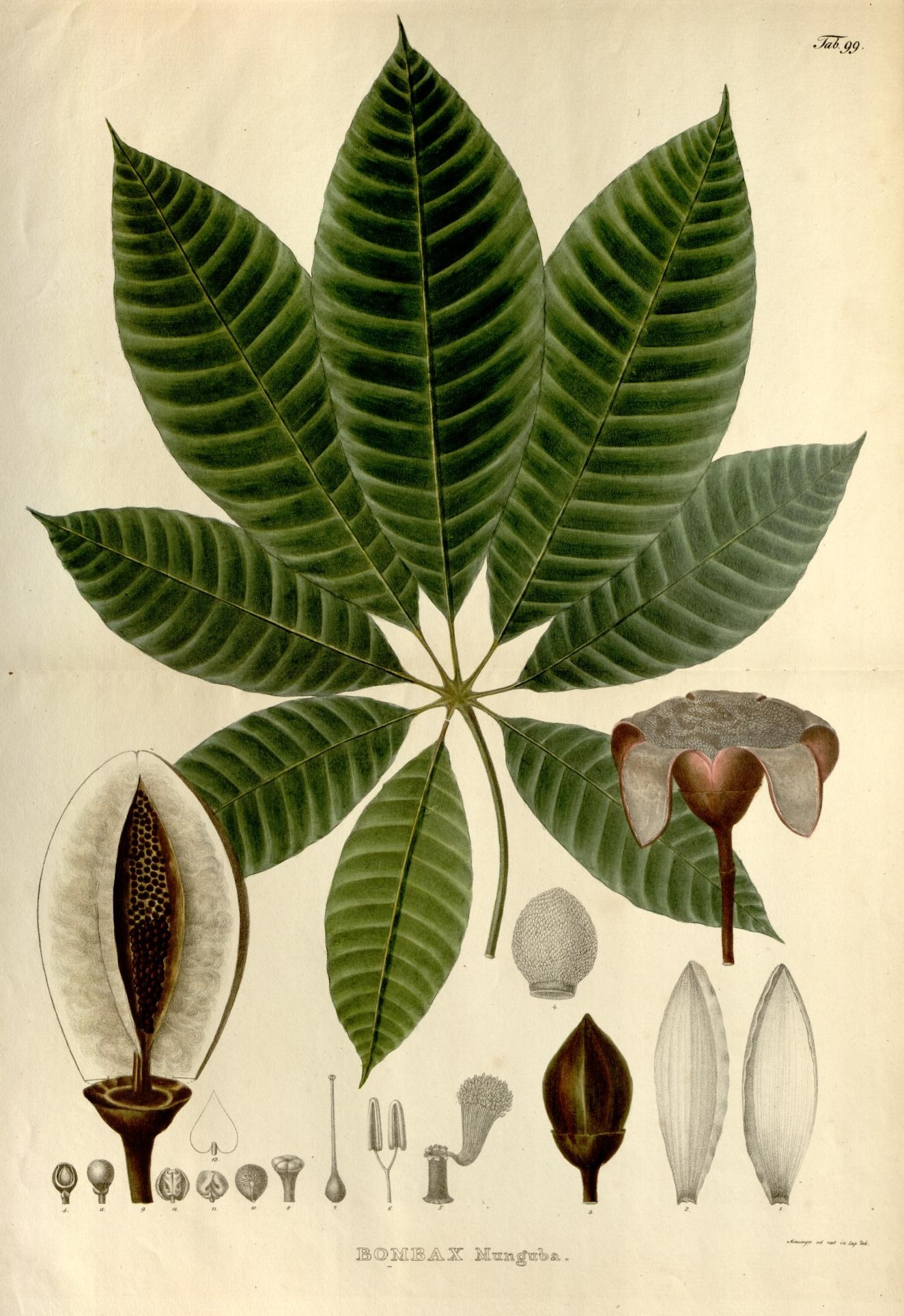 Bombax munguba = Pseudobombax munguba Nova genera et species plantarum. Monachii [Munich] :Impensis Auctoris,1824-1829 [i.e. 1824-32]..